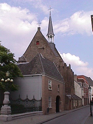 Zicht op een deel van de Waalse kerk gevestigd aan de Catharinastraat 83 in het centrum van Breda. Gelegen naast de ingang van het Begijnhof Breda Breda: Waalse kerk. Zelf gemaakt, GFDL